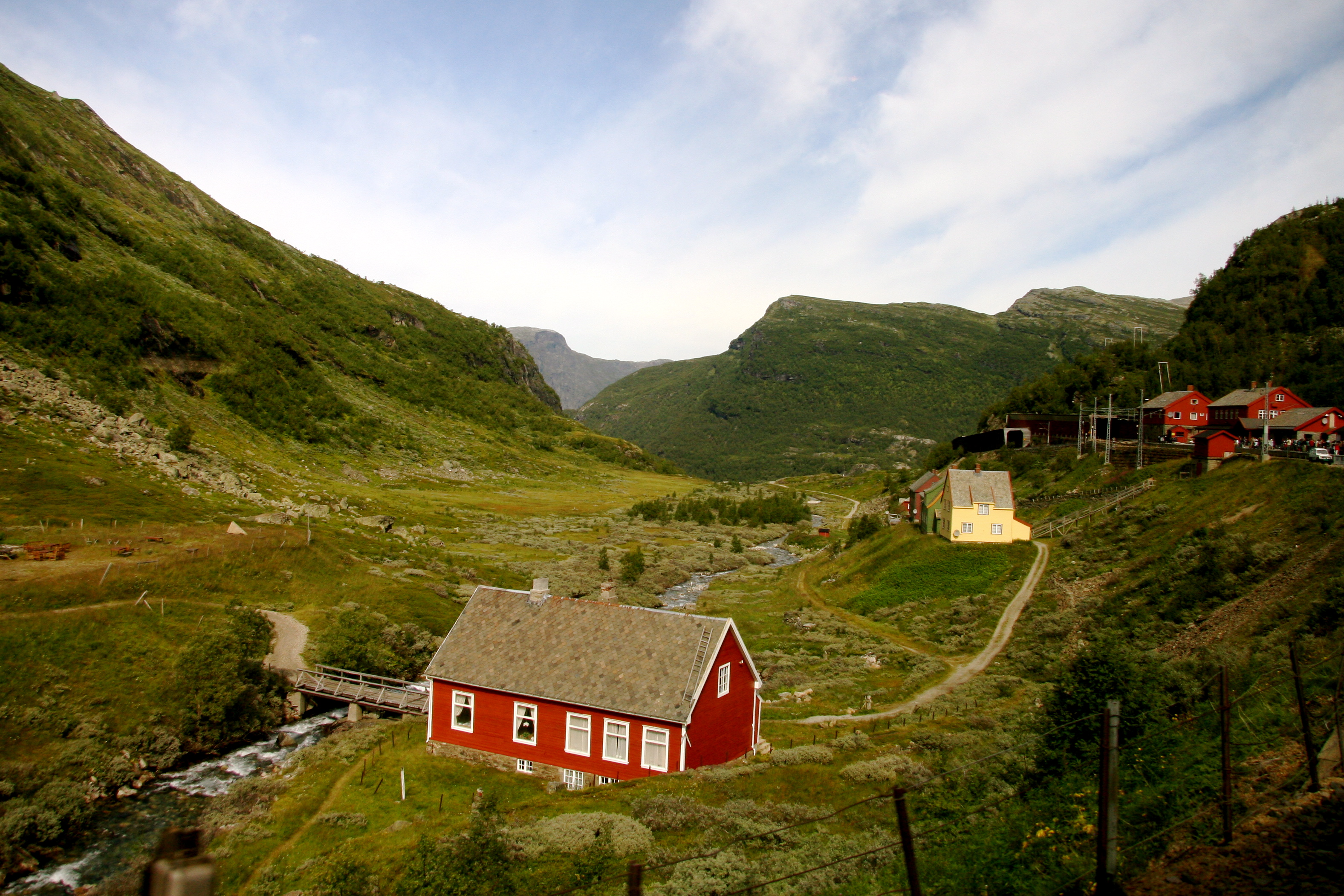 Myrdal på Bergensbanen/Flåmsbana